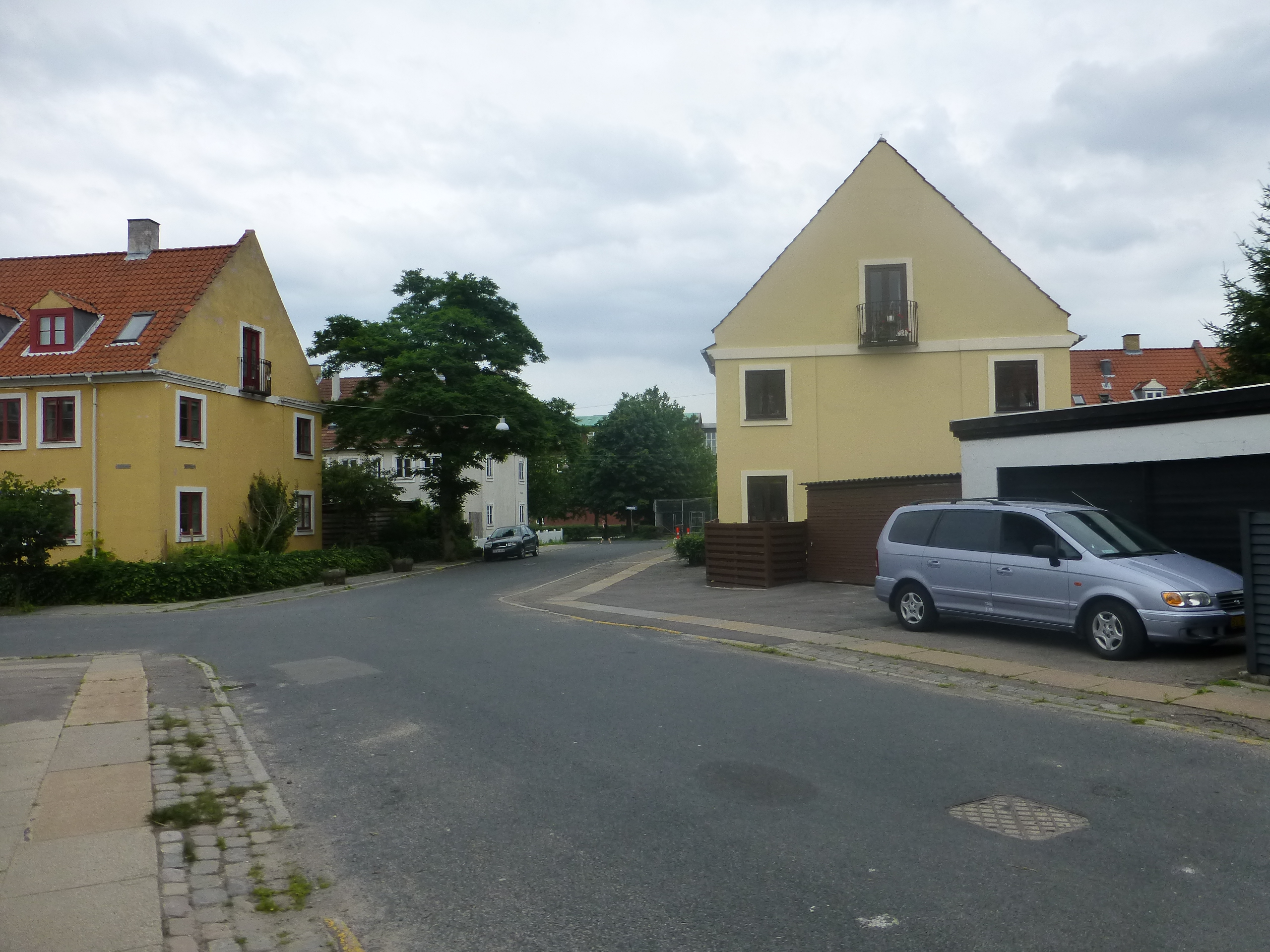 The street Gunhildsgade in Østerbro in Copenhagen.